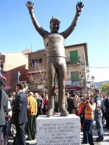 Estatua homenaje a Paquito Fernández Ochoa.